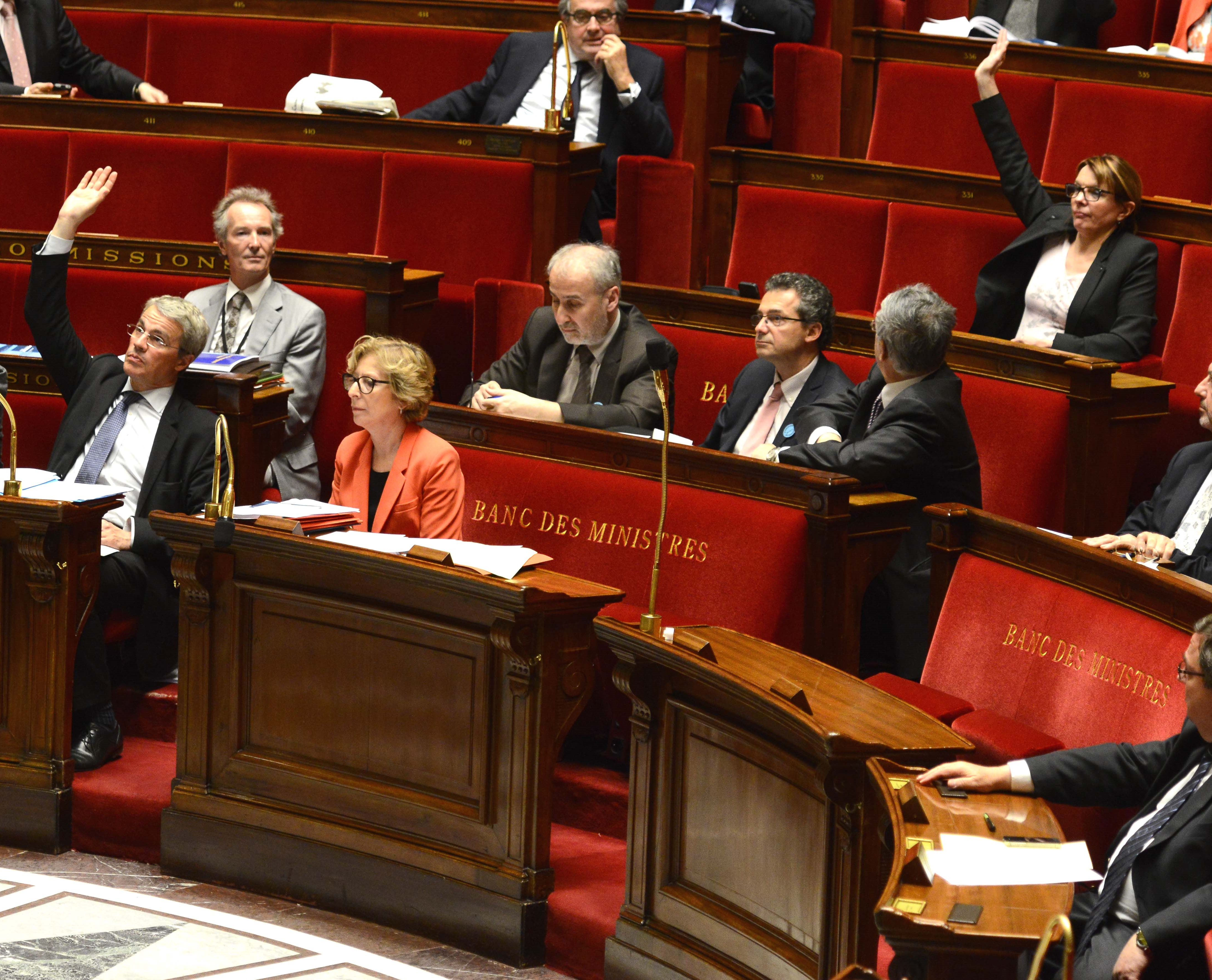 Genevièvre Fioraso presente le projet de loi relatif a l'enseignement supérieur et à la recherche à l'Assemblée Nationale